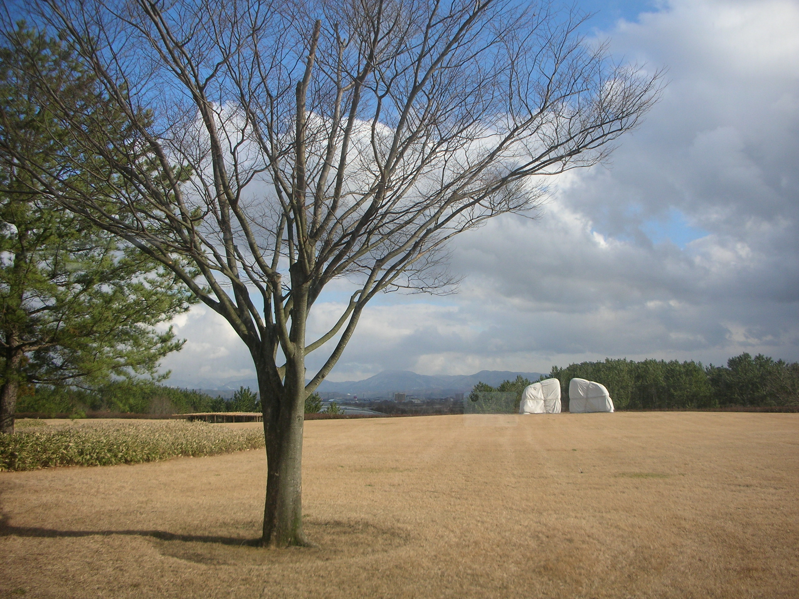 酒田市美術館構内